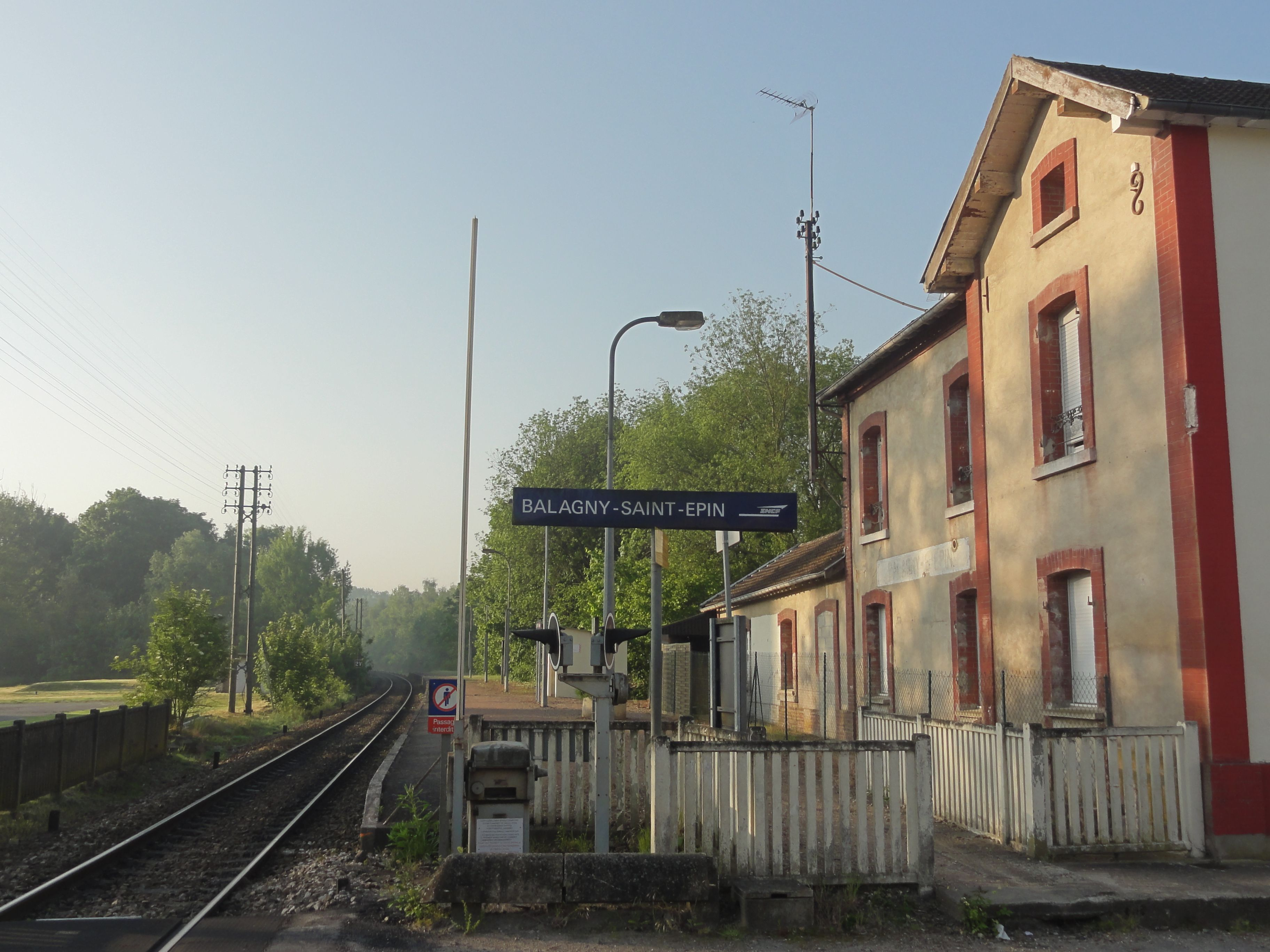 Quai et bâtiment voyageurs, vue vers l'est en direction de Creil.